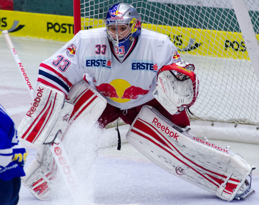 Luka Gračnar